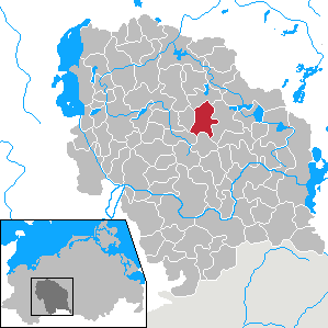 Mestlin in Mecklenburg-Vorpommern - District Parchim